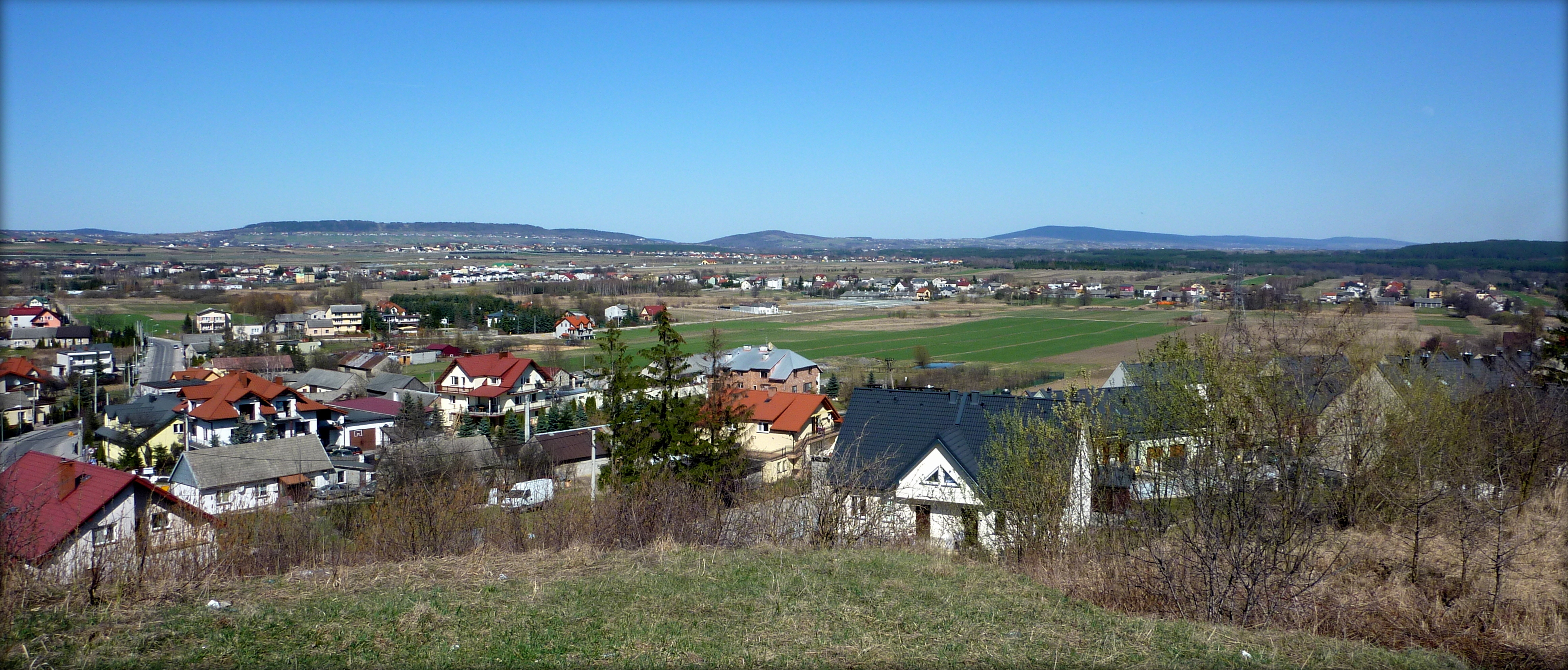 Widoczek z kieleckiego Zagórza